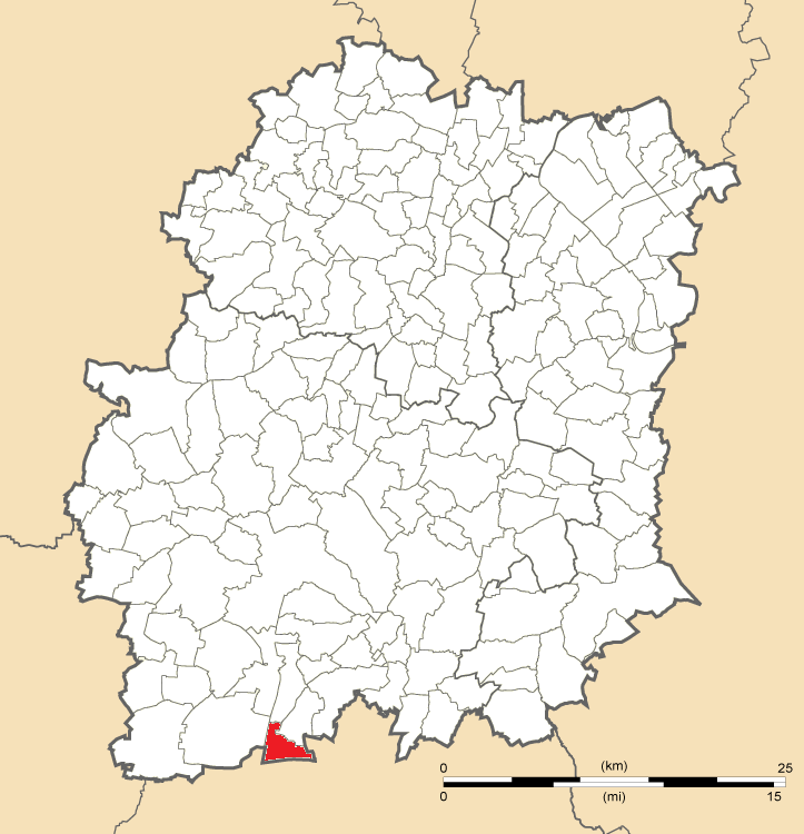 Carte de position d'Estouches en Essonne (91)